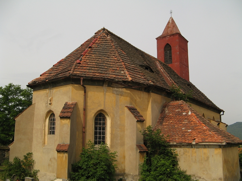 Kostel sv. Kateřiny (Chouč), Chouč